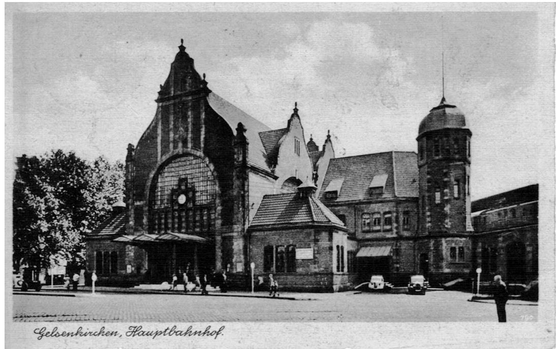 Gelsenirchen Hbf vor 1938